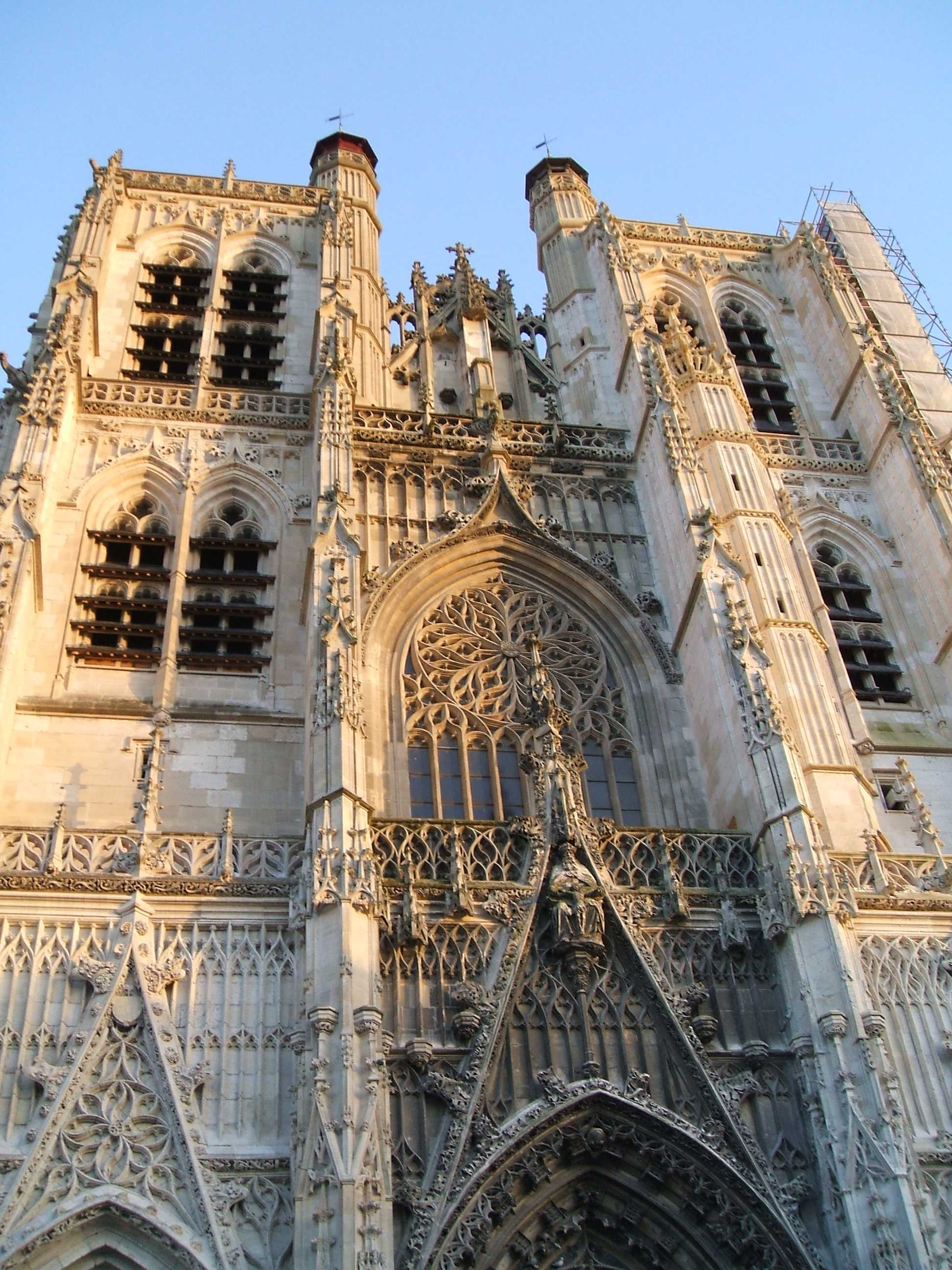 Eglise collégiale Saint Vulfran à Abbeville Somme Picardie France